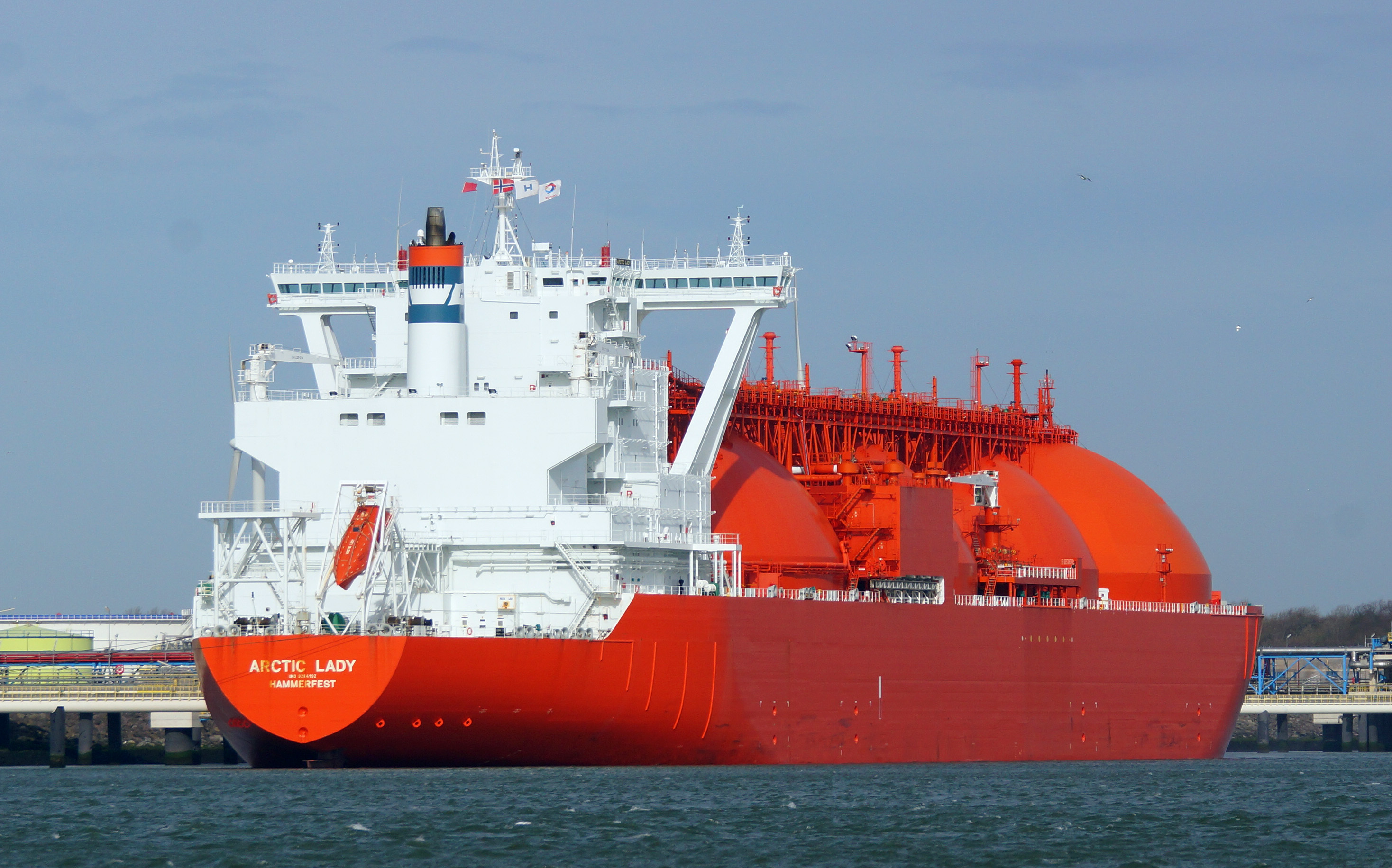 Nijlhaven 19-3-2014